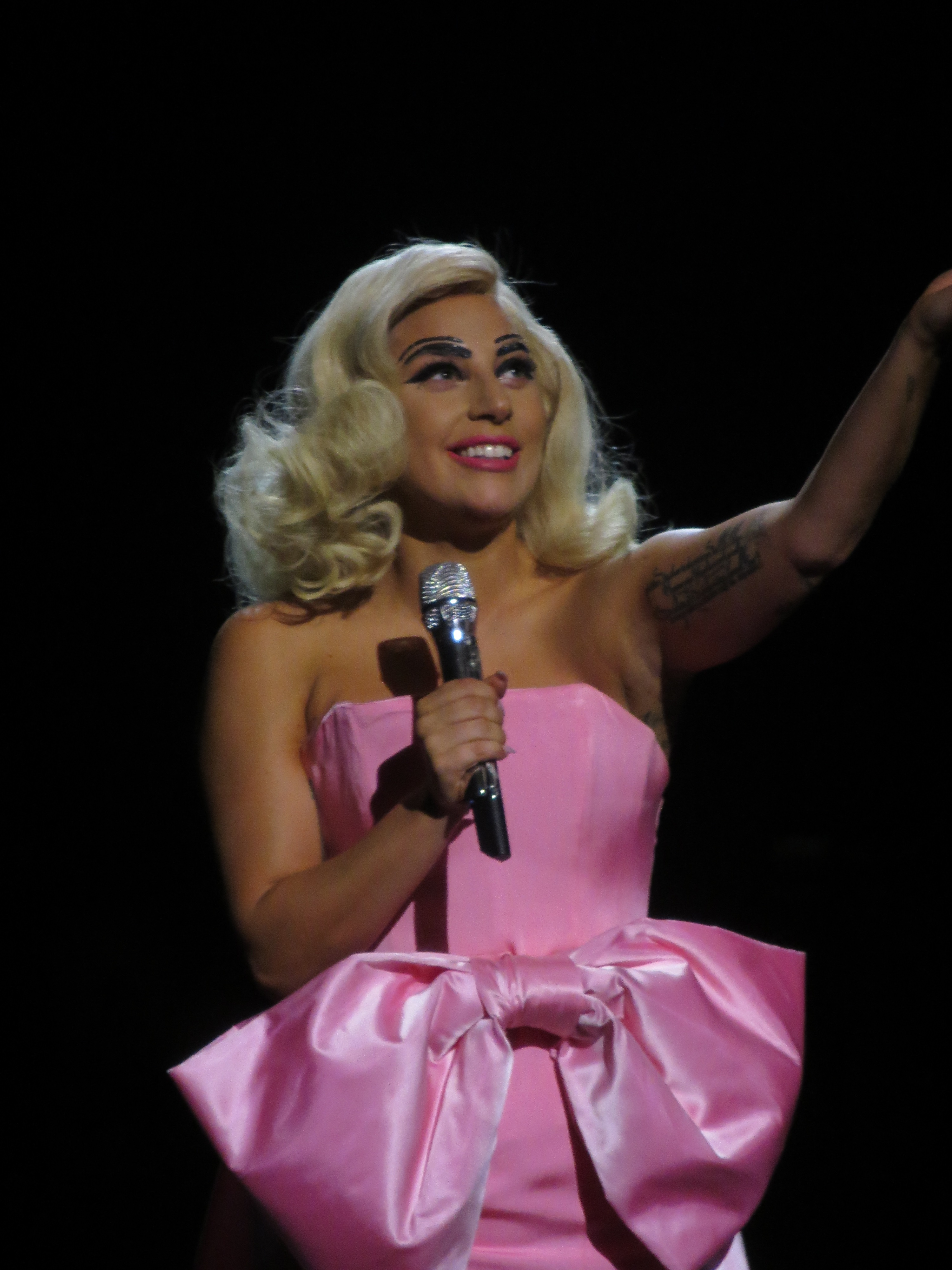 Tony Bennett & Lady GaGa 7